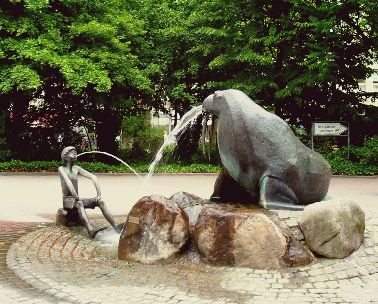 Bronzeskulptur „Antje-Brunnen“ (auch „Walrossbrunnen“ ) des deutschen Bildhauers Friedrich-Josef Müller (1932–2008), genannt Frijo Müller-Belecke. Aufgestellt 1991 vor dem Alstertal-Einkaufszentrum in Hamburg-Poppenbüttel im Rahmen des Projektes „Kunst im öffentlichen Raum“.